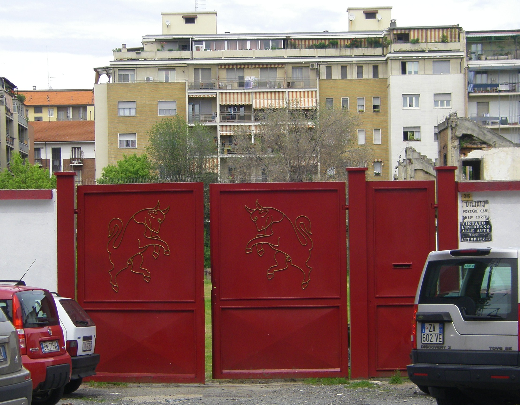 Eingangstor des ehemaligen Stadio Filadelfia